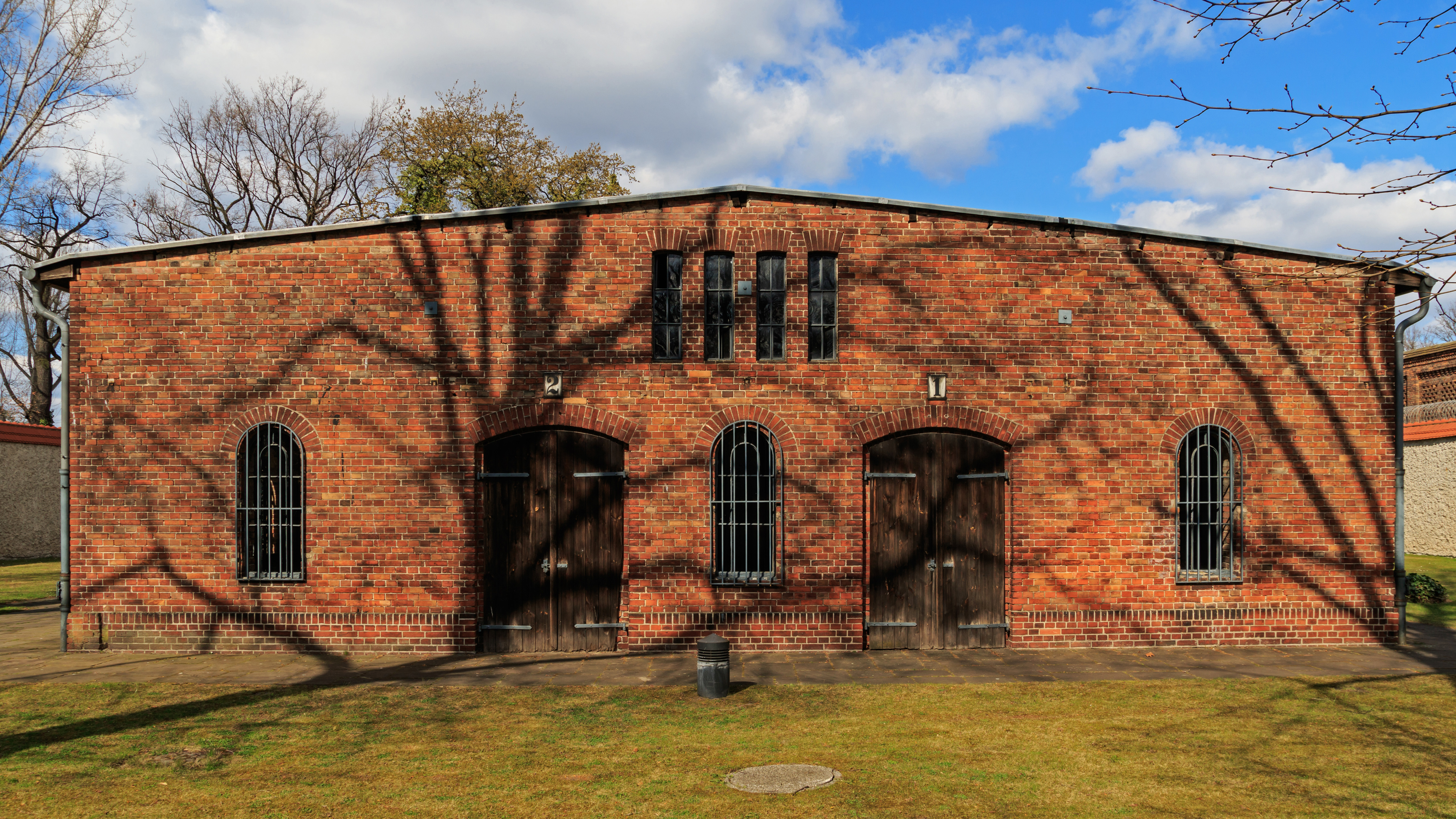 Gedenkstätte Plötzensee: ehem. Hinrichtungsschuppen